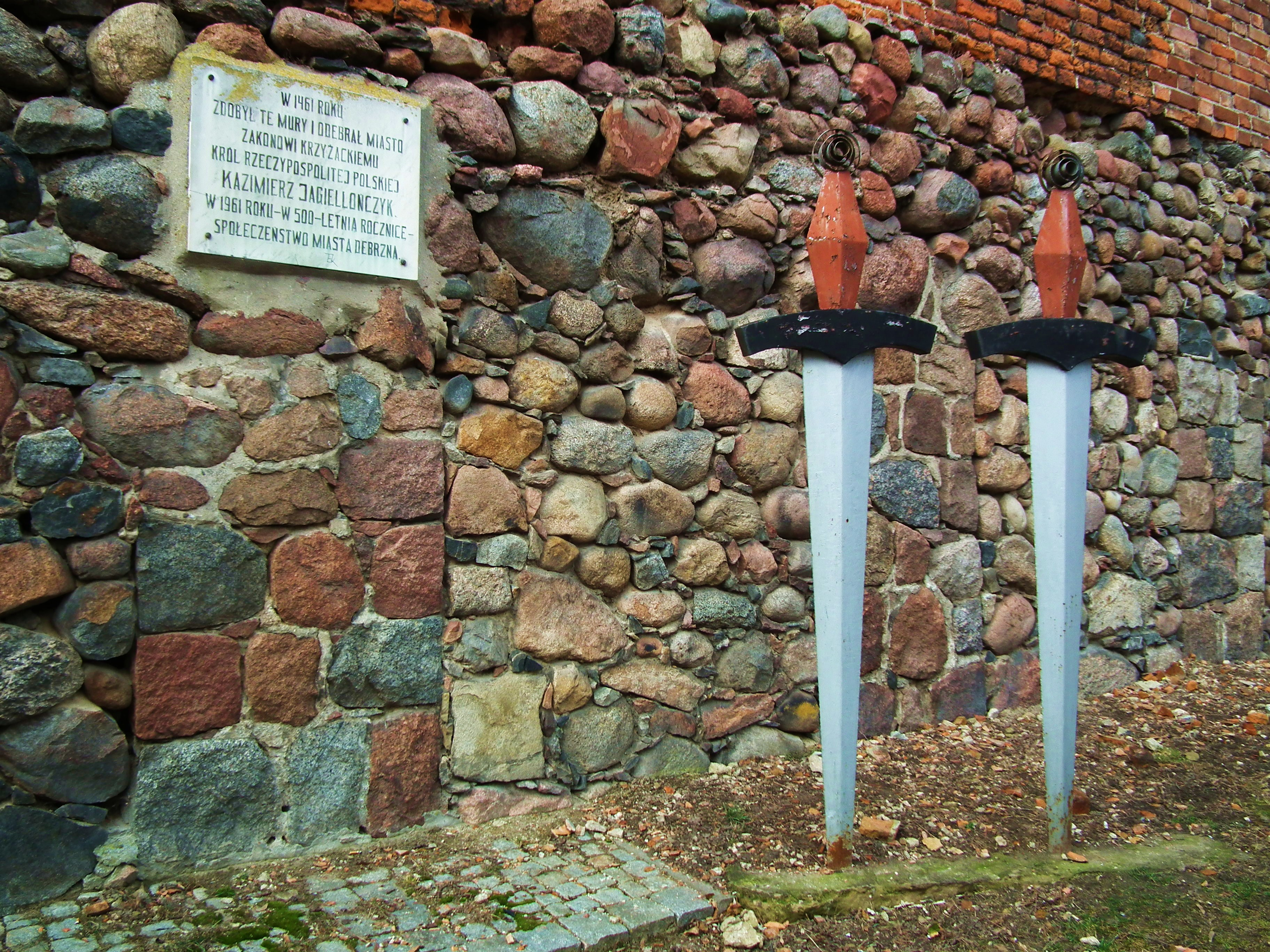 Mury miejskie w Debrznie.